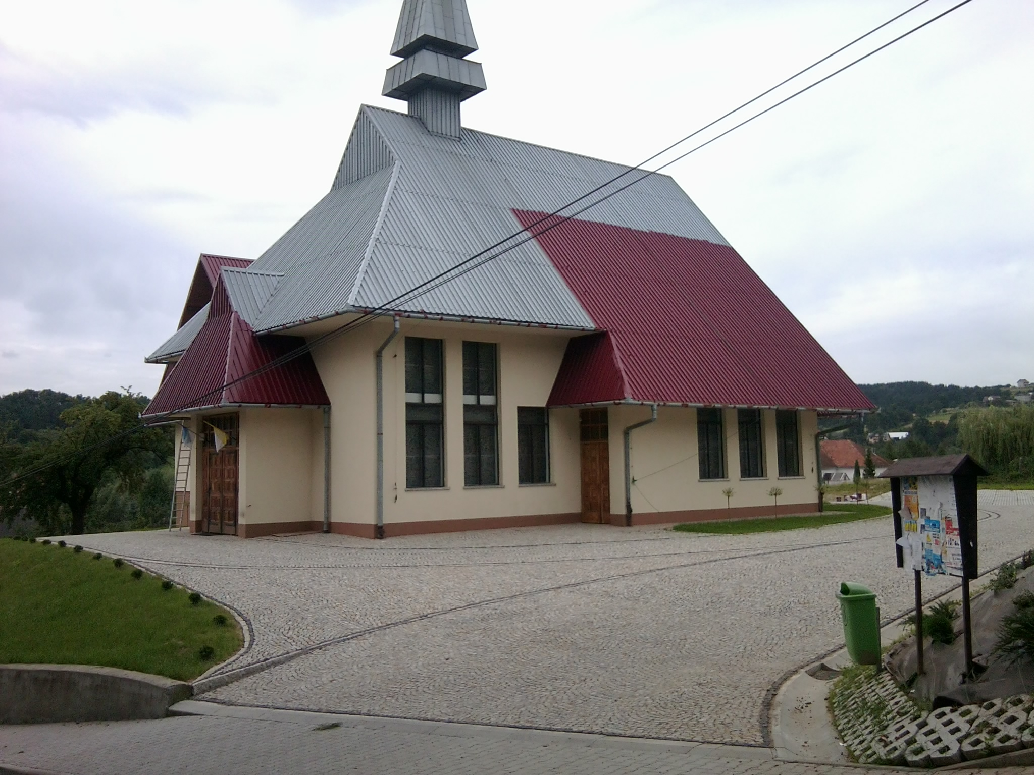 Kaplica mszalna św. Józefa w Gostwicy